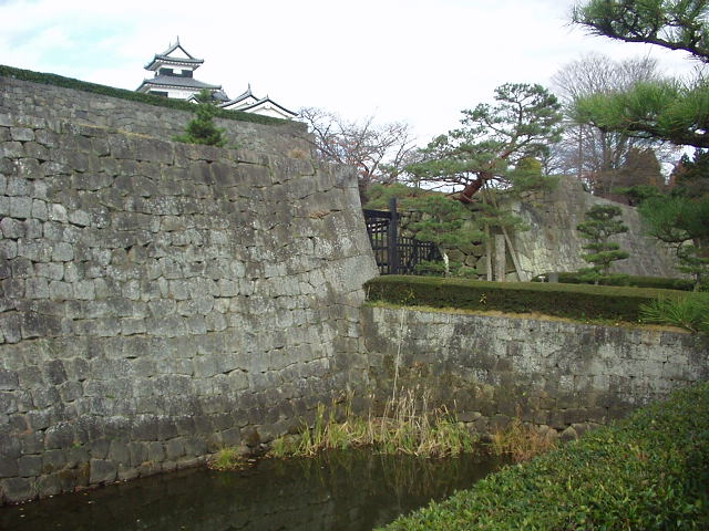 Shimizu Gate of the Shirakawa Komine Castle. Shirakawa, Fukushima prefecture, Japan.